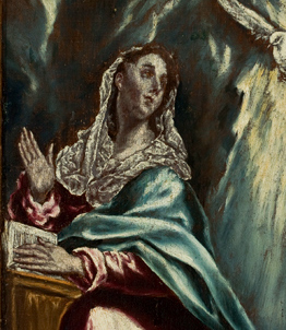 Detalhe da Anunciação de El Greco, no MASP.